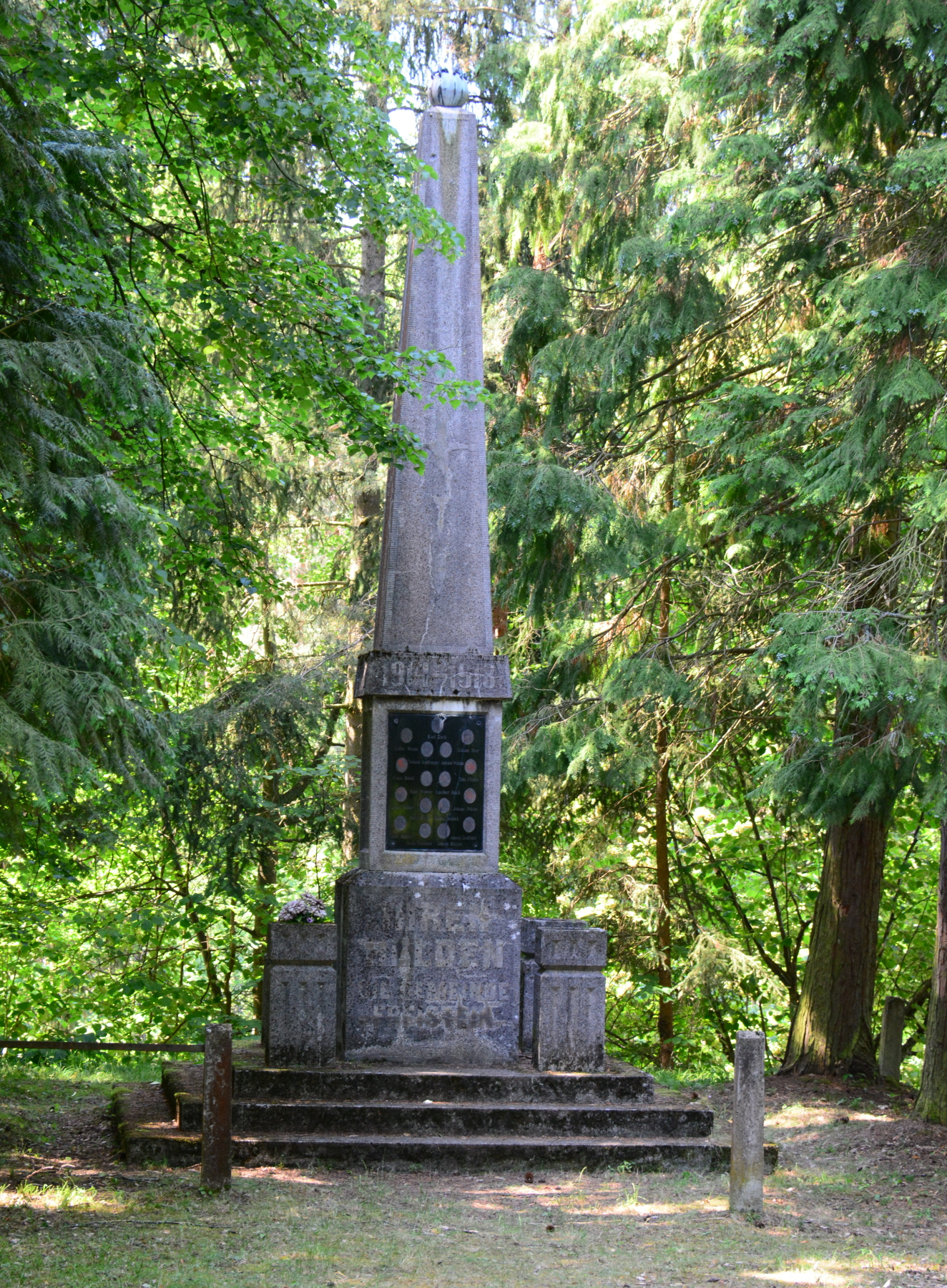 Kriegerdenkmal (Erster Weltkrieg) in Podhradí nad Dyjí / Freistein in Südmähren (Tschechische Republik) Karl ZACH + Stefan REGEN + Johann BEER + Johann KARLBERGER + Johann WALTER + Franz HÜTTEL + Otto PFEIFER + Karl WINTER + Lambert BACH + Josef WALTER + Johann PELZER + Josef BASTL + Franz JELINEK + Karl HÜTTEL + Franz MATZINGER + Johann BOIGNER + Johann ENSFELDER